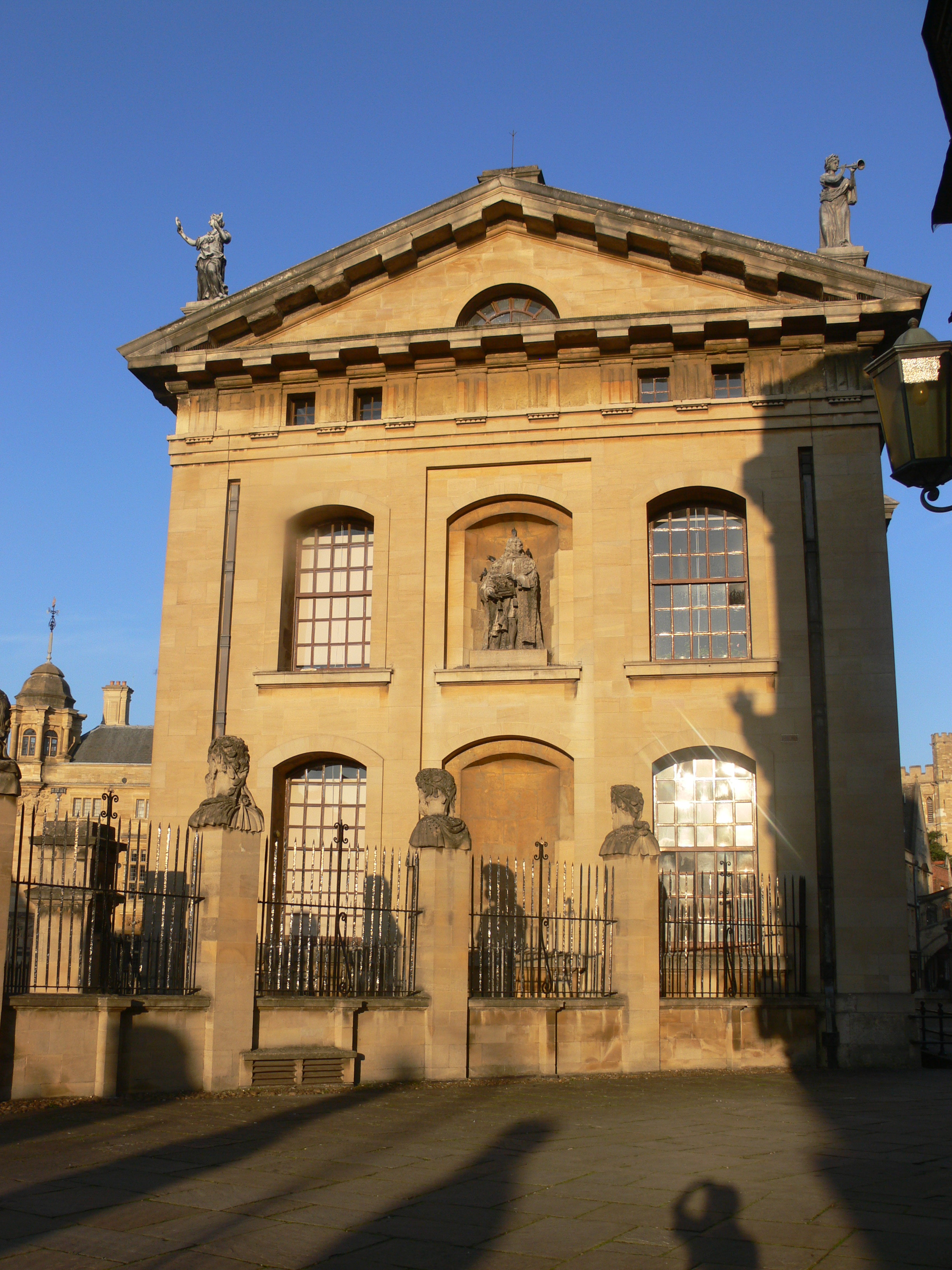 Oxford - Bodleian Library